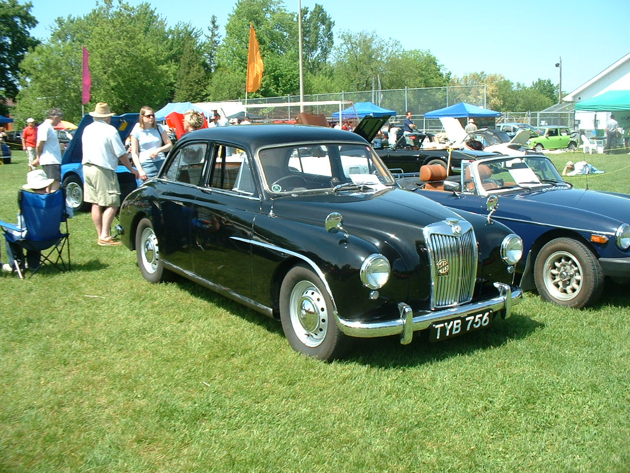 MG ZA Magnette in Hudson, Quebec